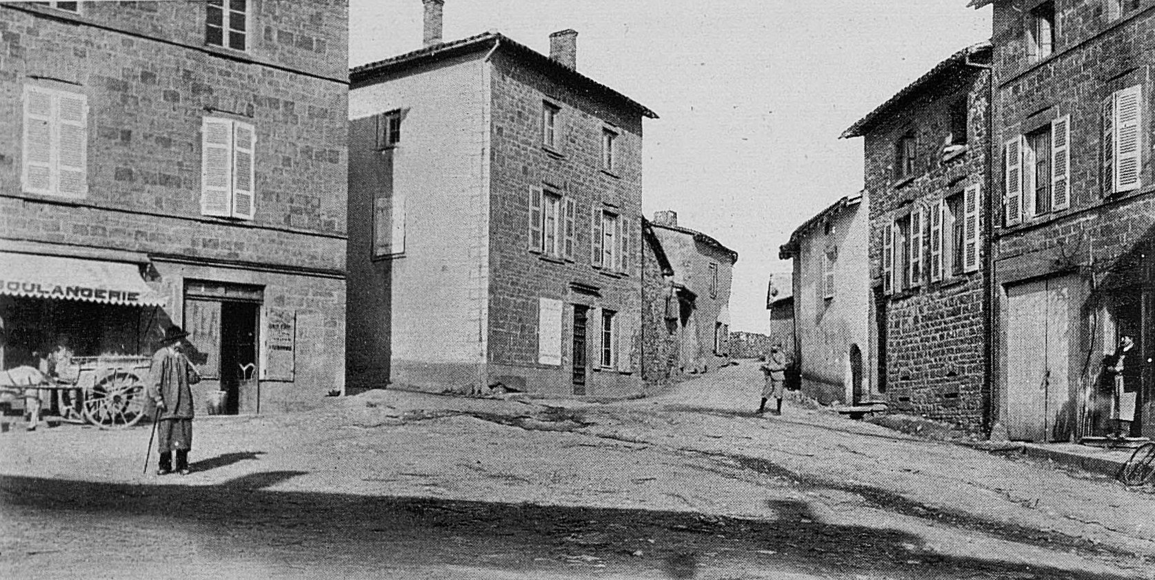 Dictionnaire illustré des communes du département du Rhône. Tome 1 / par MM. E. de Rolland et D. Clouzet.